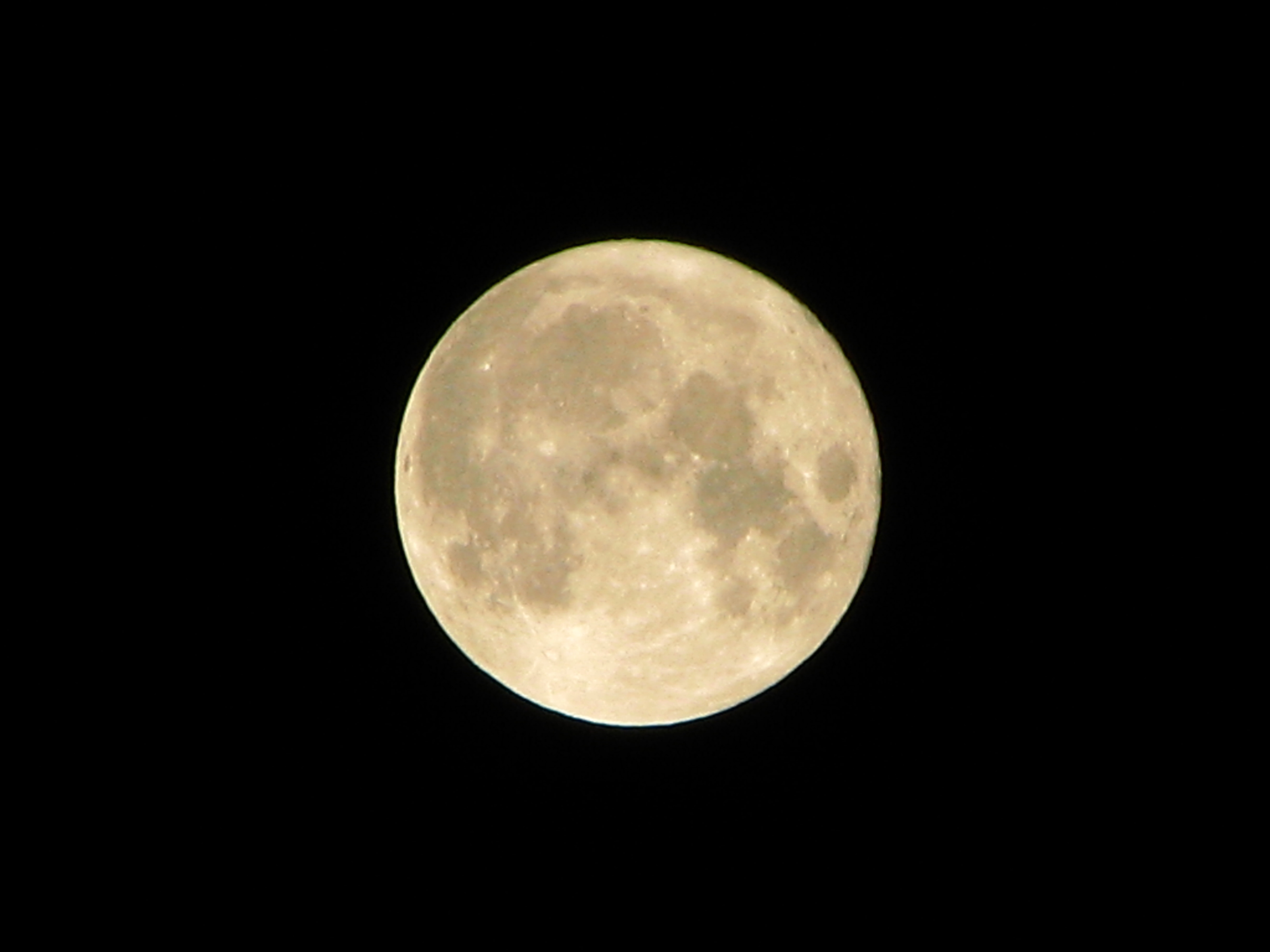 A full moon seen from Mississauga, Ontario, Canada.